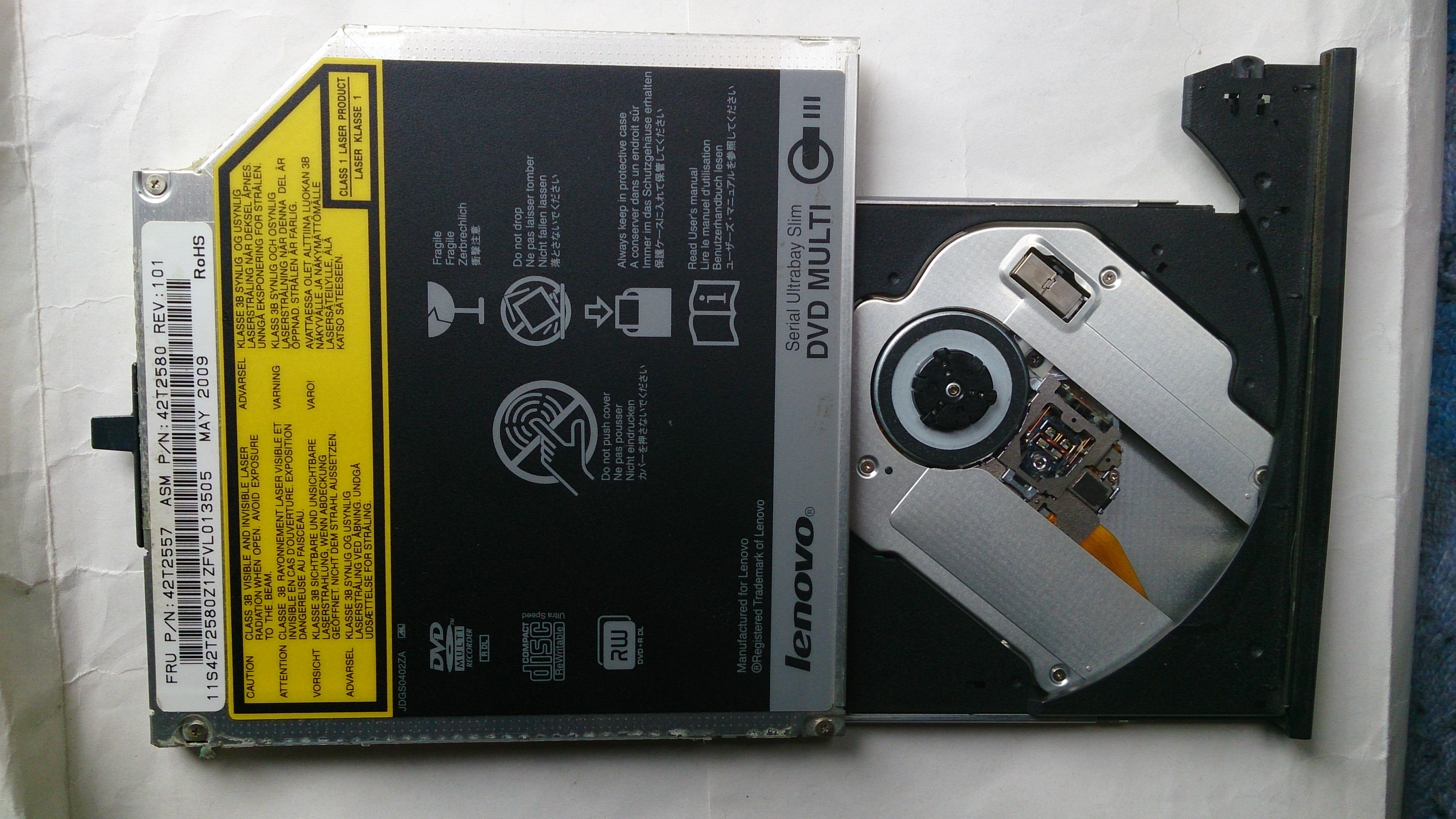 Pro lenovo T500